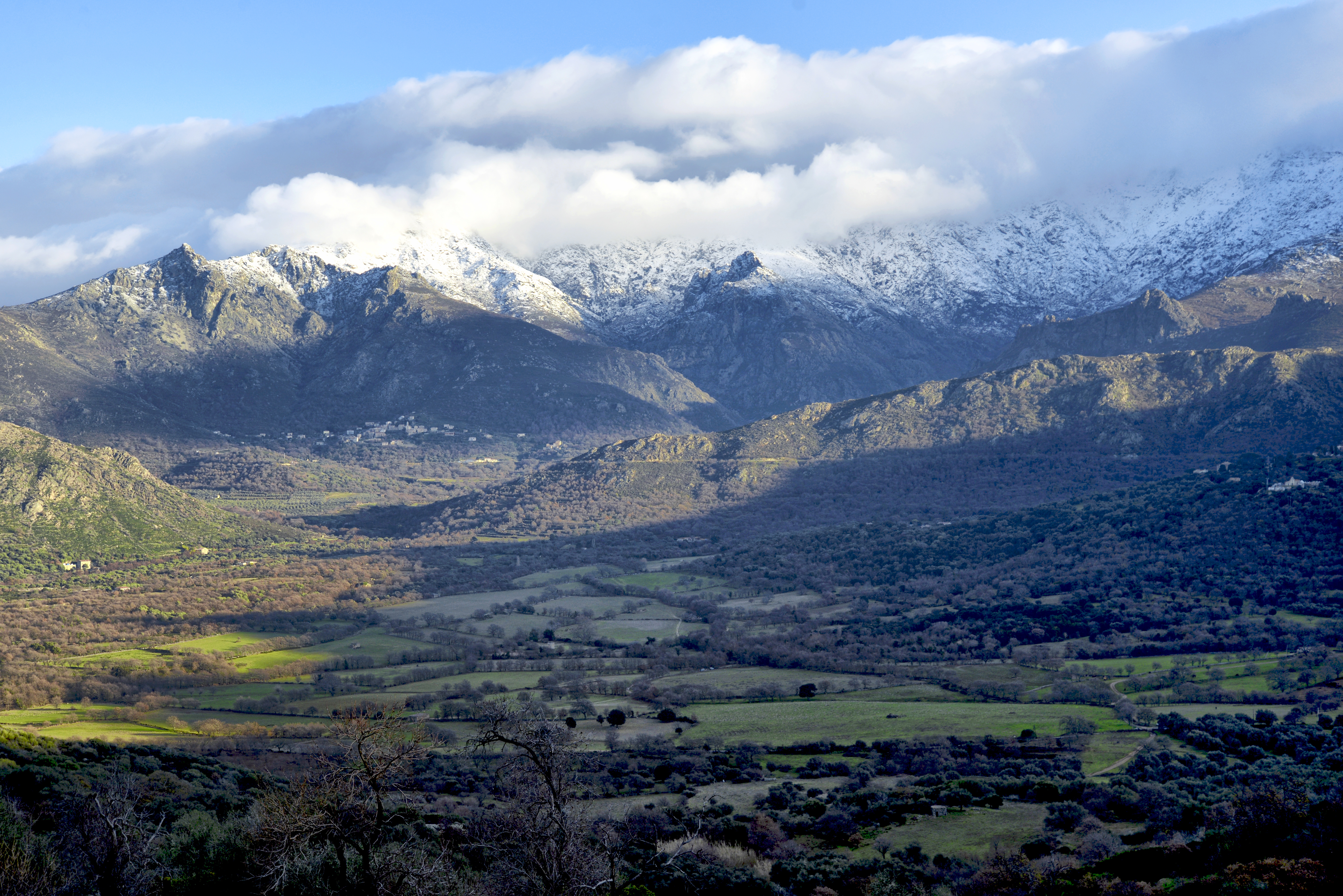 Cateri, Balagne (Haute-Corse) - Vue de la partie haute de la vallée du Regino depuis San Cesareo (Cateri)